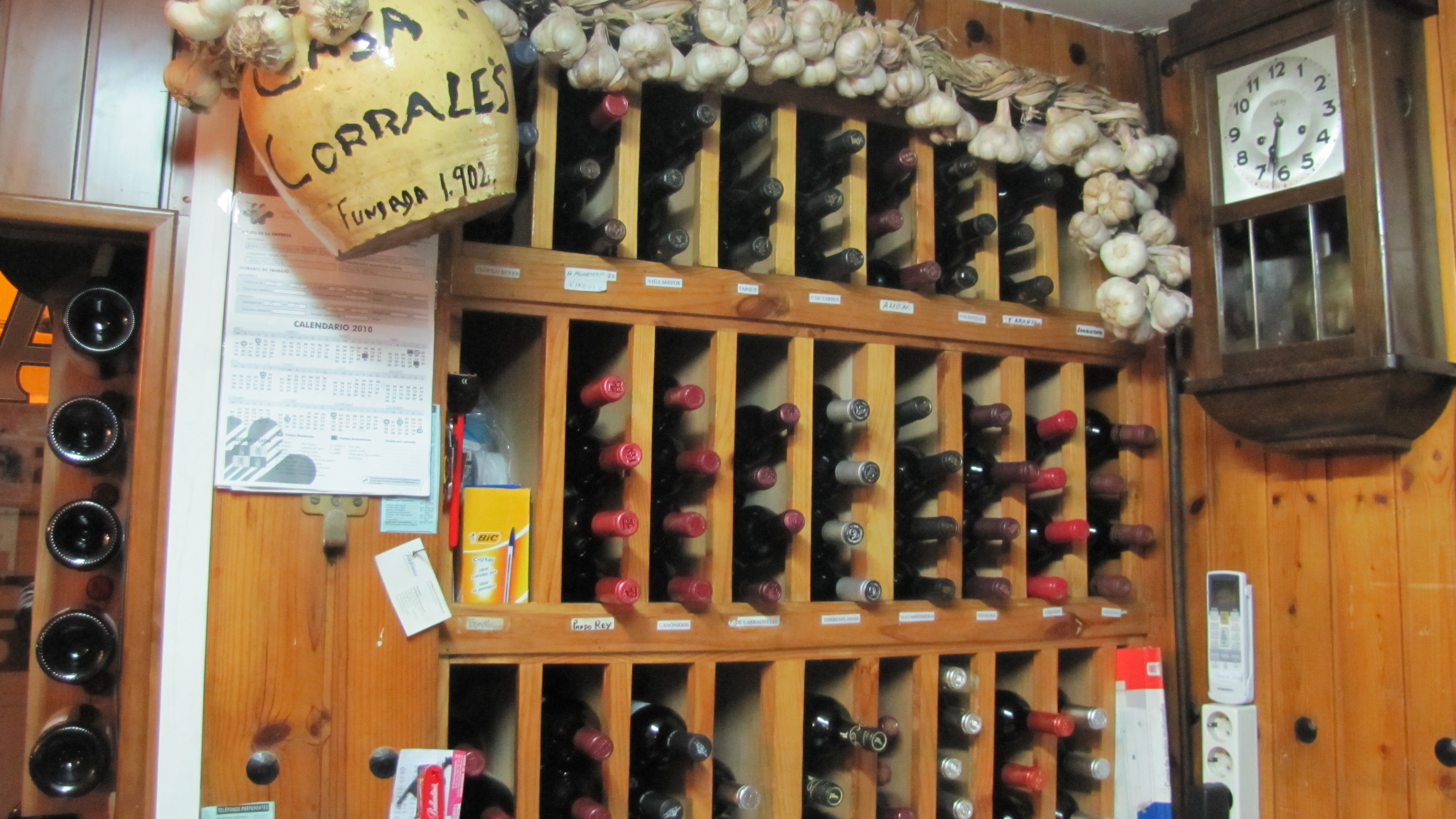 Bodega de botellas de vino de Ribera del Duero, del Asador Rafael Corrales, en Aranda de Duero (Burgos, España. En la fotografía se puede obserbar un botijo de barro, donde se puede leer: "Casa Corrales Fundadda 1902". Las botellas de vino estan distrubuidas por bodega y marca, todas ellas de D. O. Ribera del Duero.